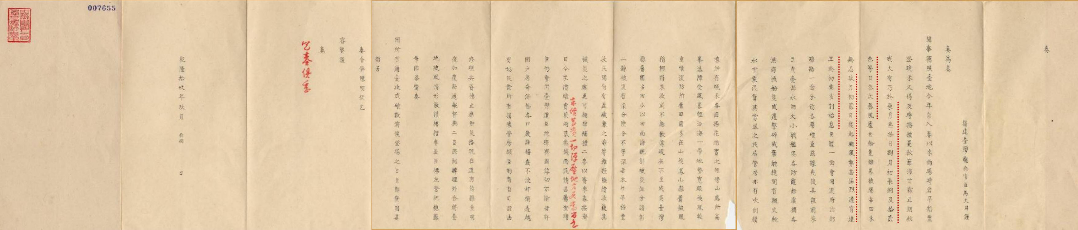 福建臺灣總兵官馬大用奏臺灣七、八月風災事，乾隆十九年九月十八日（1754年11月2日）上。